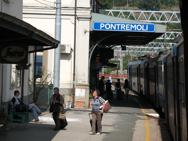 Stazione ferroviaria di Pontremoli. Banchina del primo binario dopo l'arrivo di un treno